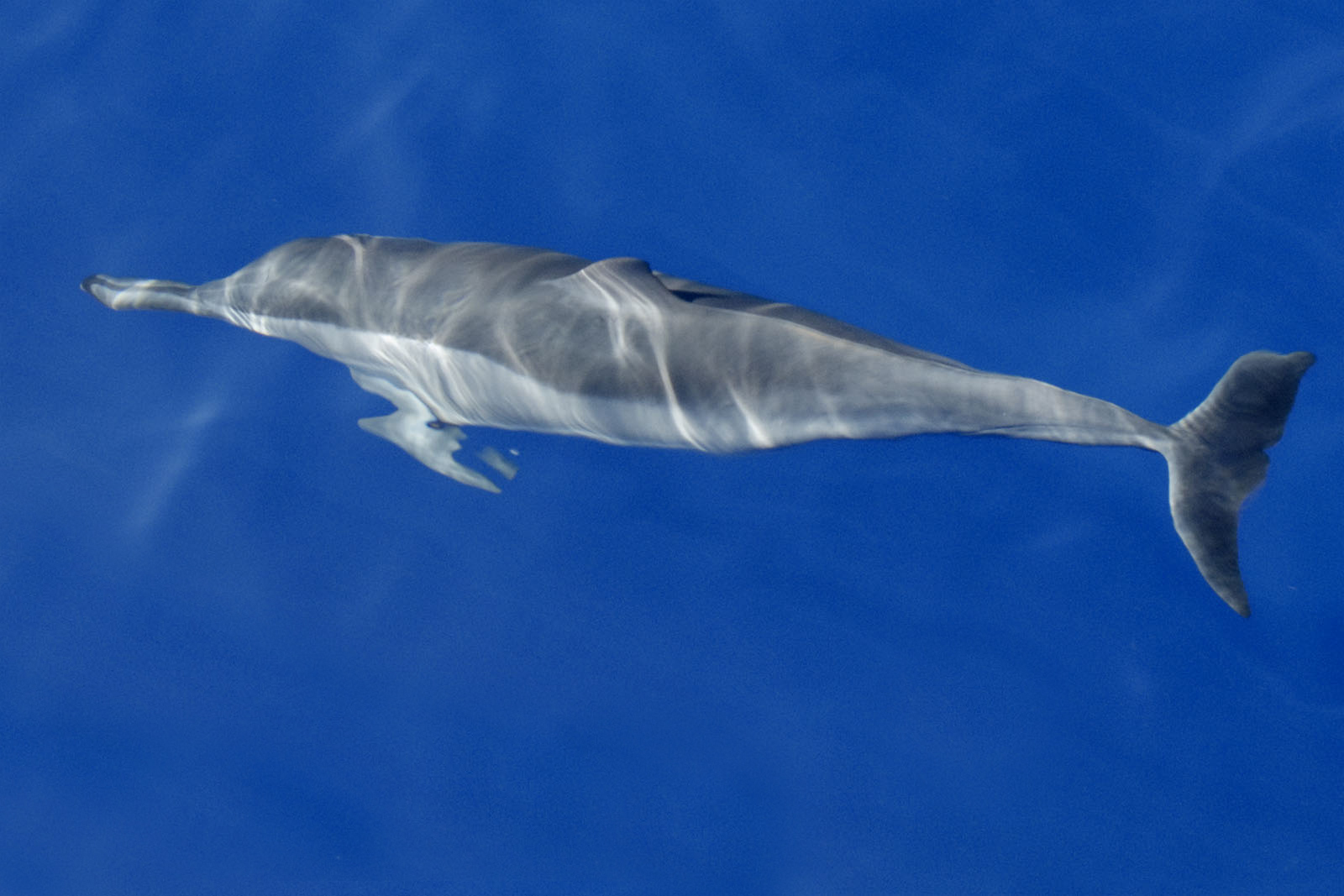 Stenella longirostris, Lanai, Hawaii.